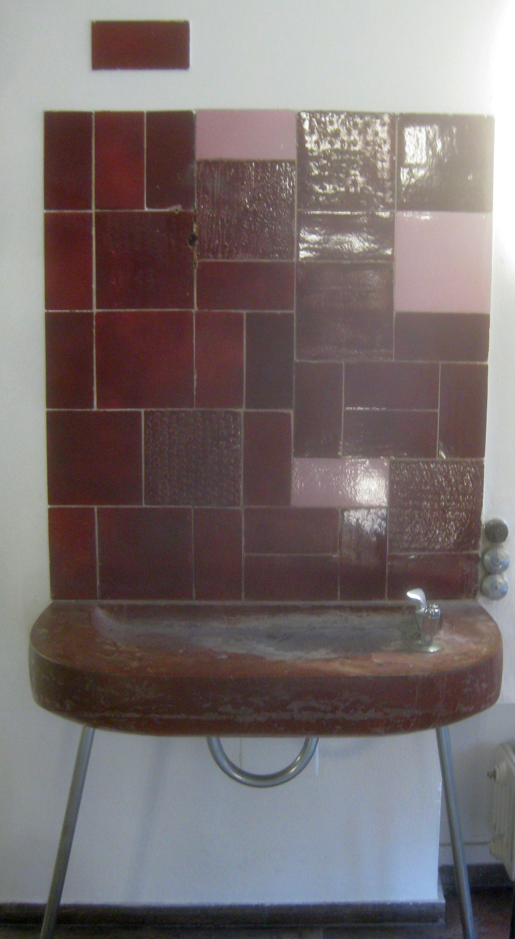 Wandbrunnen, Kunststeinbecken, Rückwand mit Keramikplatten von Eva Zippel, 1961, Stuttgart, Königin-Olga-Stift, 1. Etage.